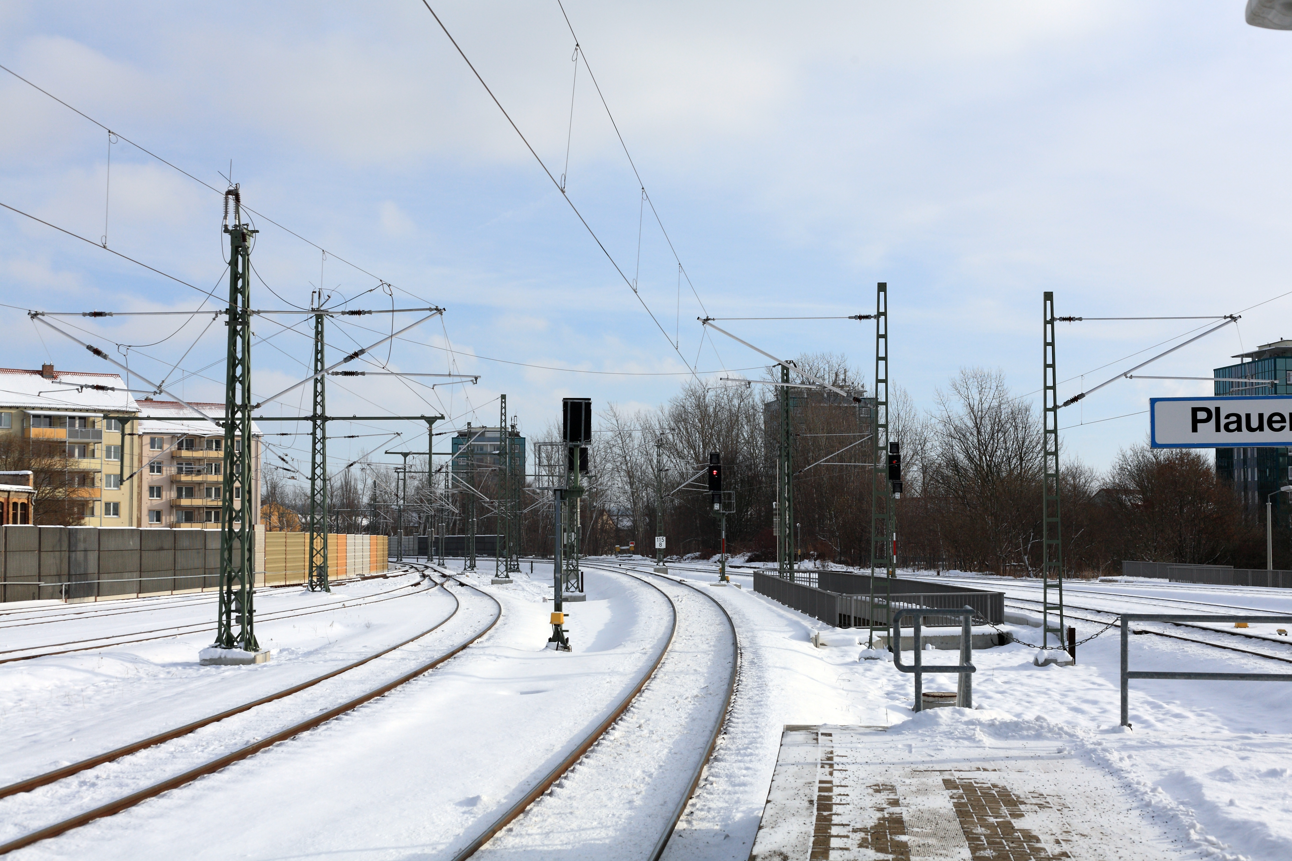 Vom Bahnsteig 3/4 mit den durchgehenden Hauptgleisen Richtung Reichenbach (Vogtl) ob Bf. Die Fahrleitungsstützpunkte sind in den Bögen ohne Y-Beiseil, damit sind hier trotz Neigetechnikertüchtigung elektrisch nur 100km/h möglich.